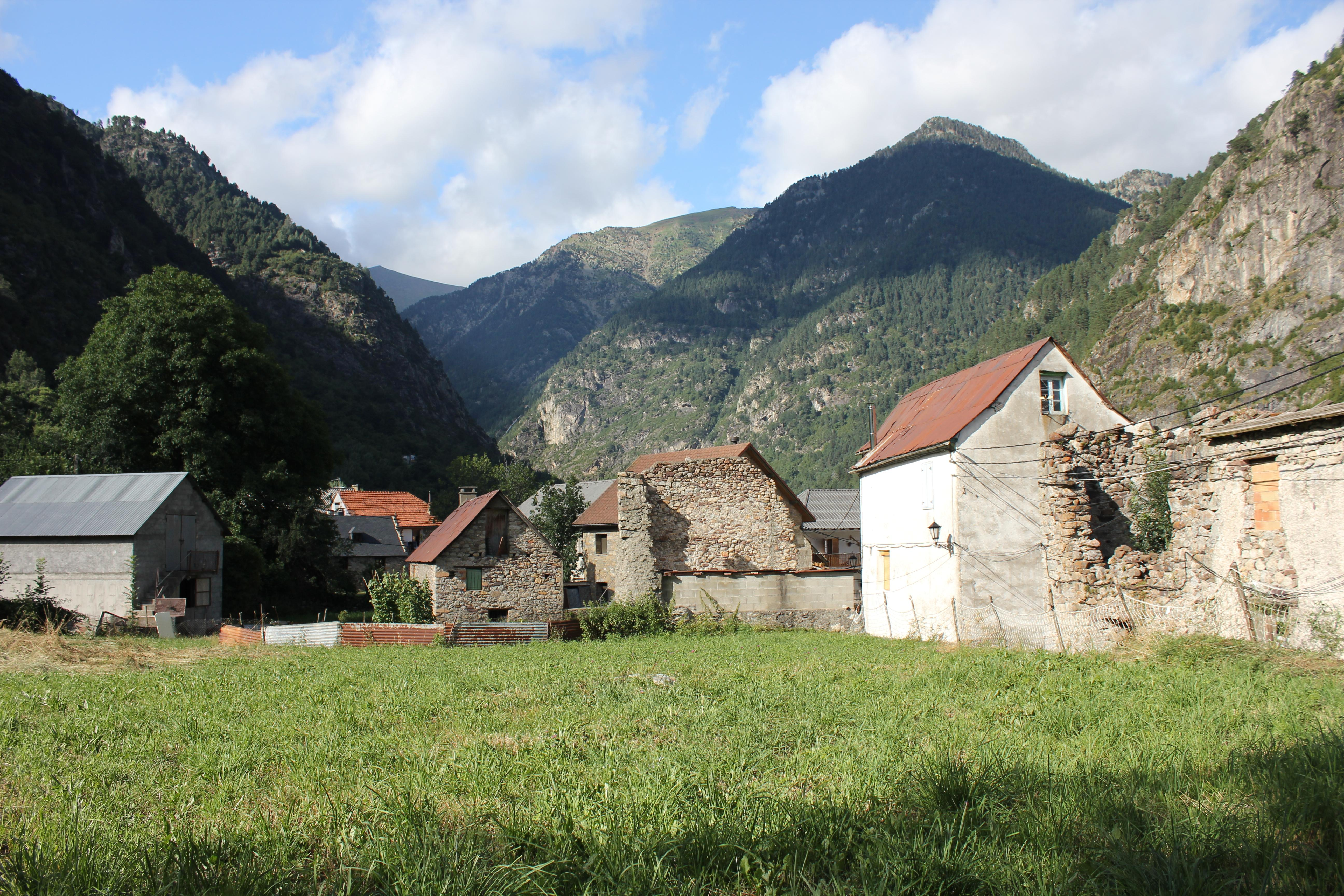 Aragonés: Parzán